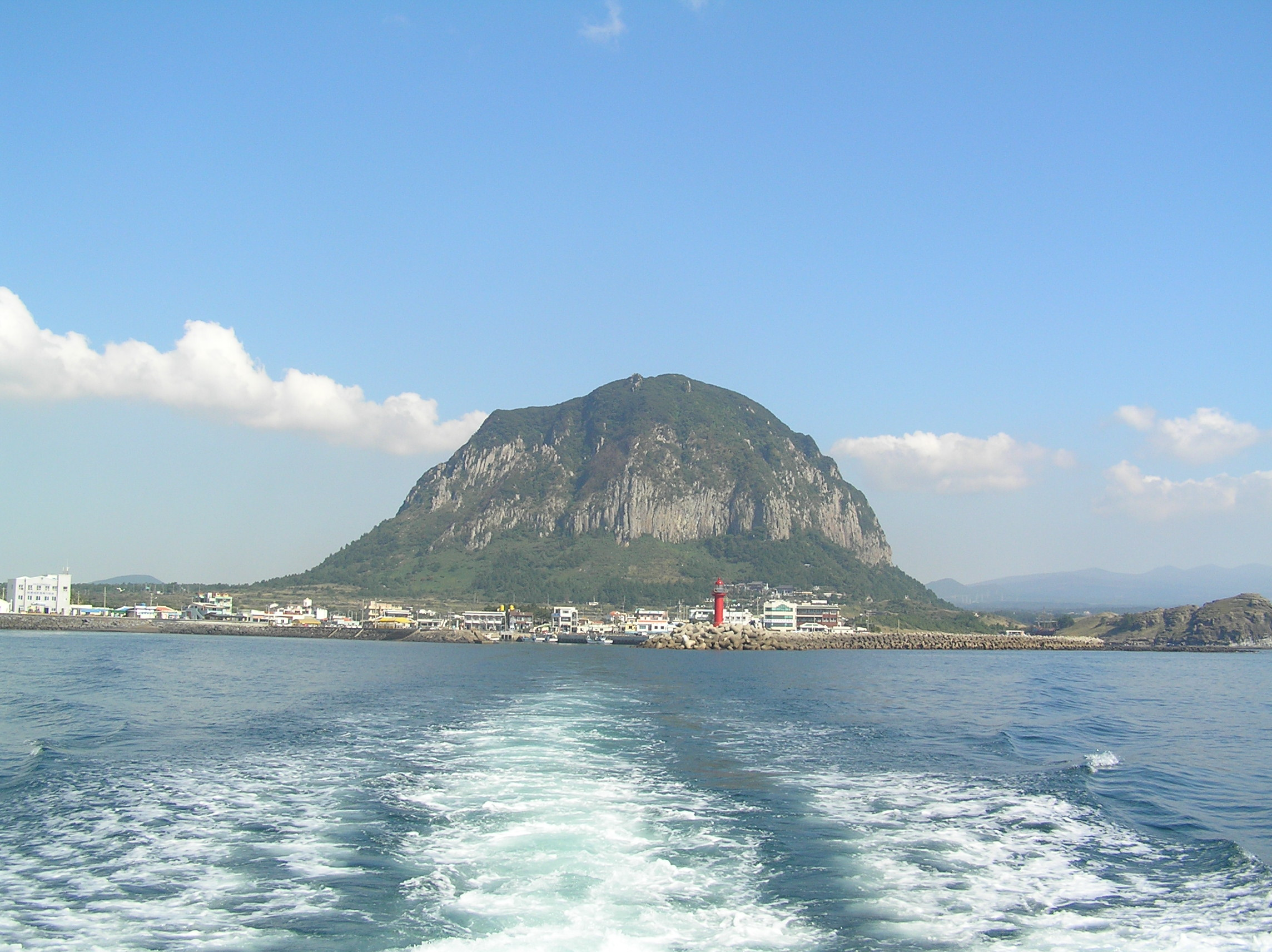 Hwasun-ri, Andeok-myeon, Namjeju-gun